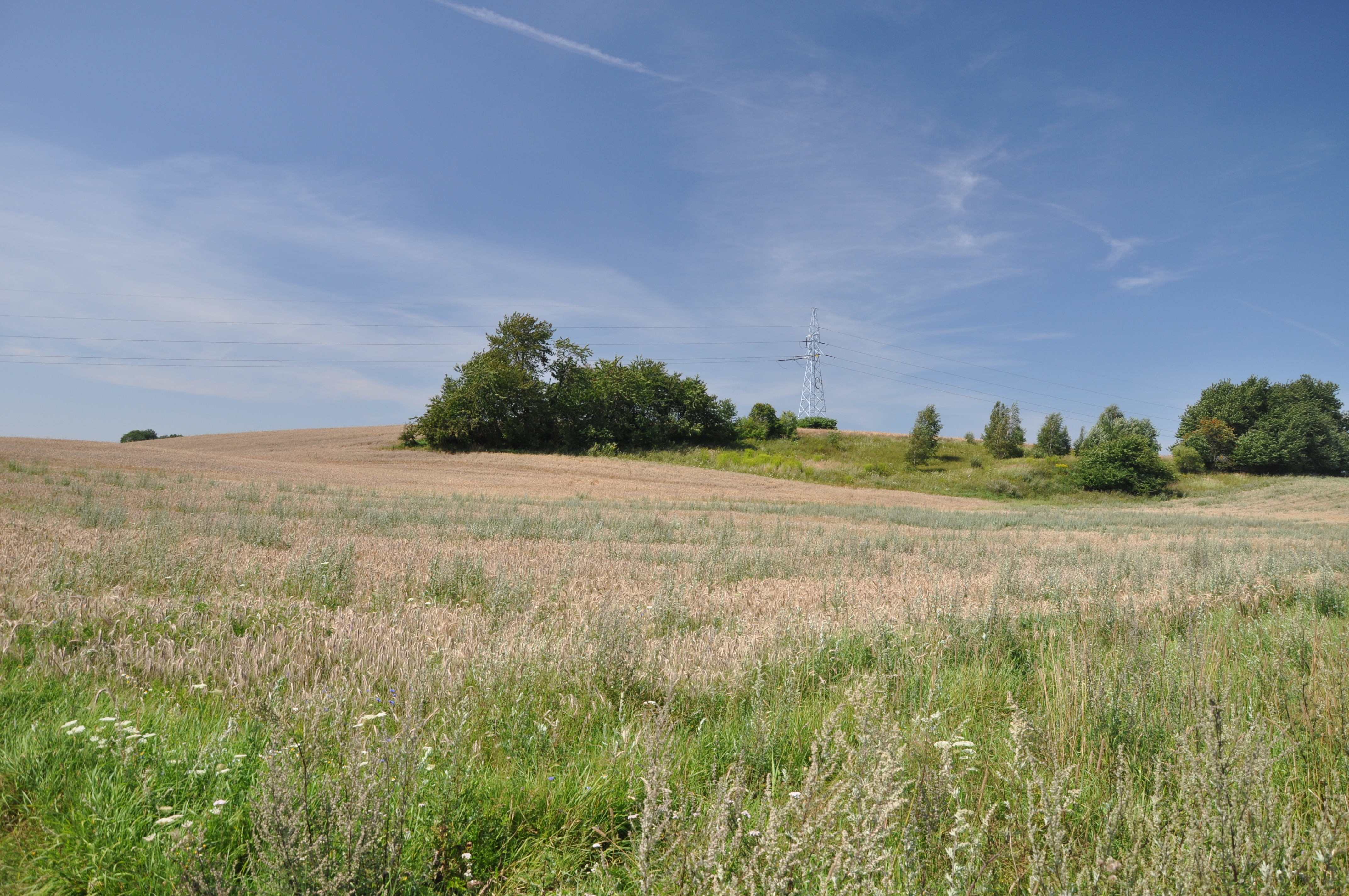 Lewicka Góra (35,9 m n.p.m.) – ujęcie od południowego wschodu, z drogi polnej z Lewic do Gąbina